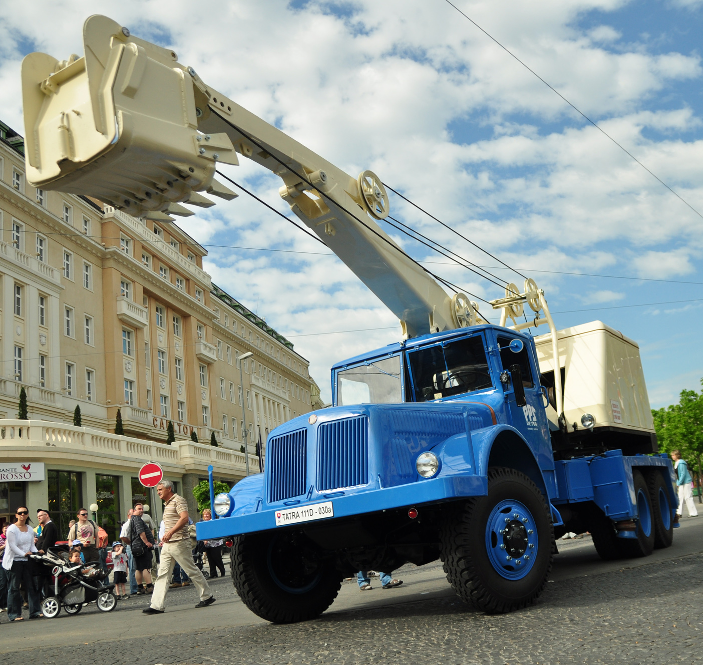 Prvomájová Veterán Tatra Raly Bratislava